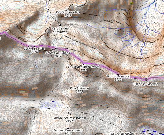 carte réalisée sur umap This map may be incomplete, and may contain errors. Don't rely solely on it for navigation.